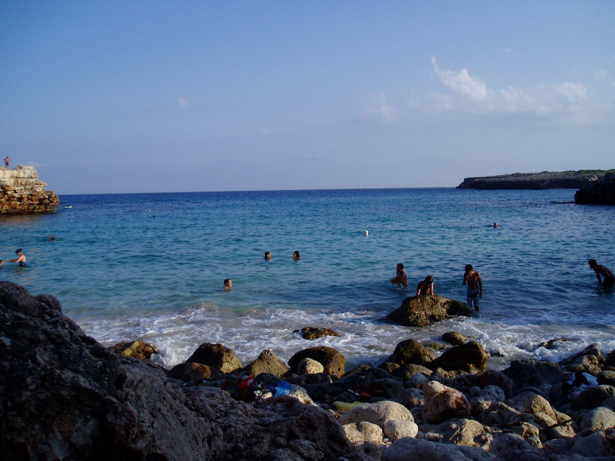 Cala Morlanda, Porto Cristo, Mallorca, Spain